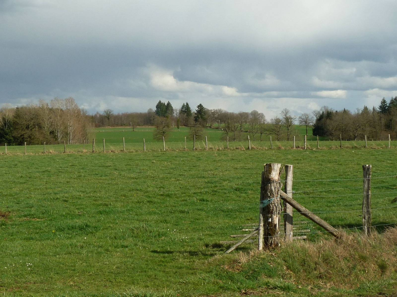 paysage limousin entre St-Quentin-sur-Charente et Pressignac, Charente, France